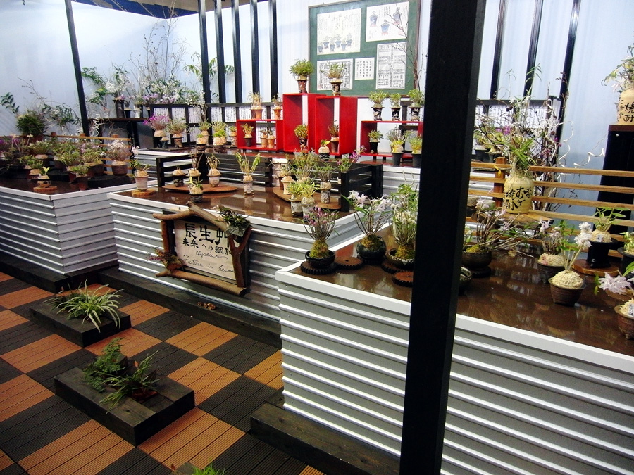 JGP2012【部門3】 最優秀賞 「長生艸」 未来への調和 2012/02/26東京ドームにて撮影